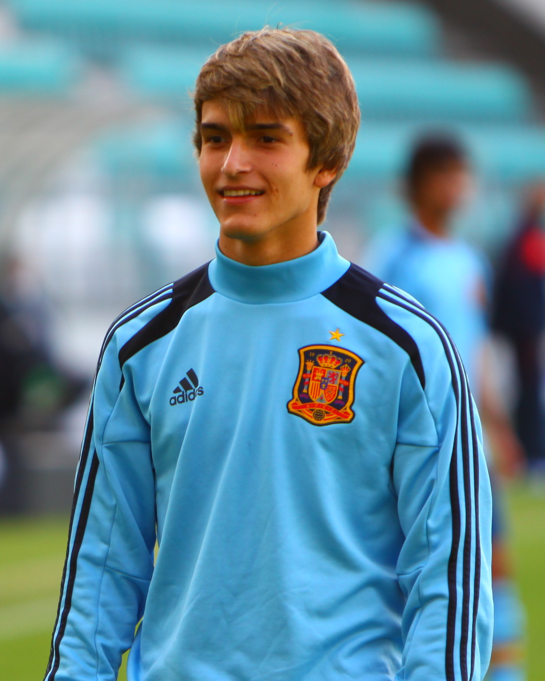 U-19 Portugal vs Spain.